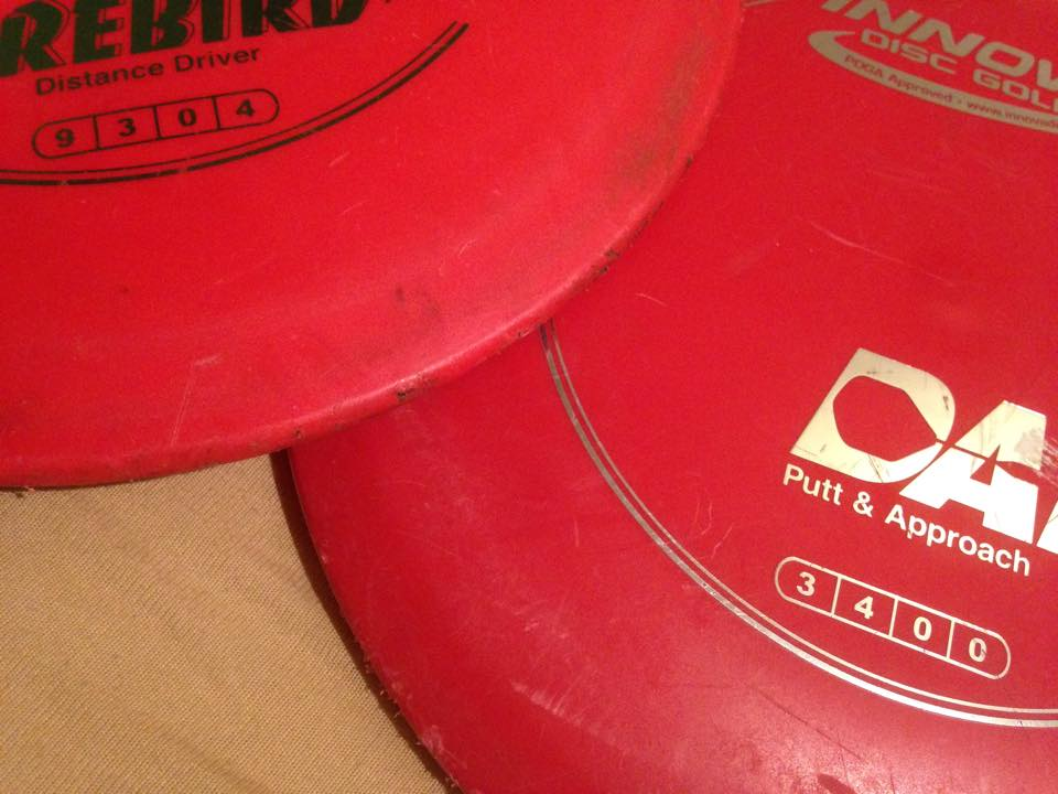 En driver og en putter som viser diskenes egenskaper